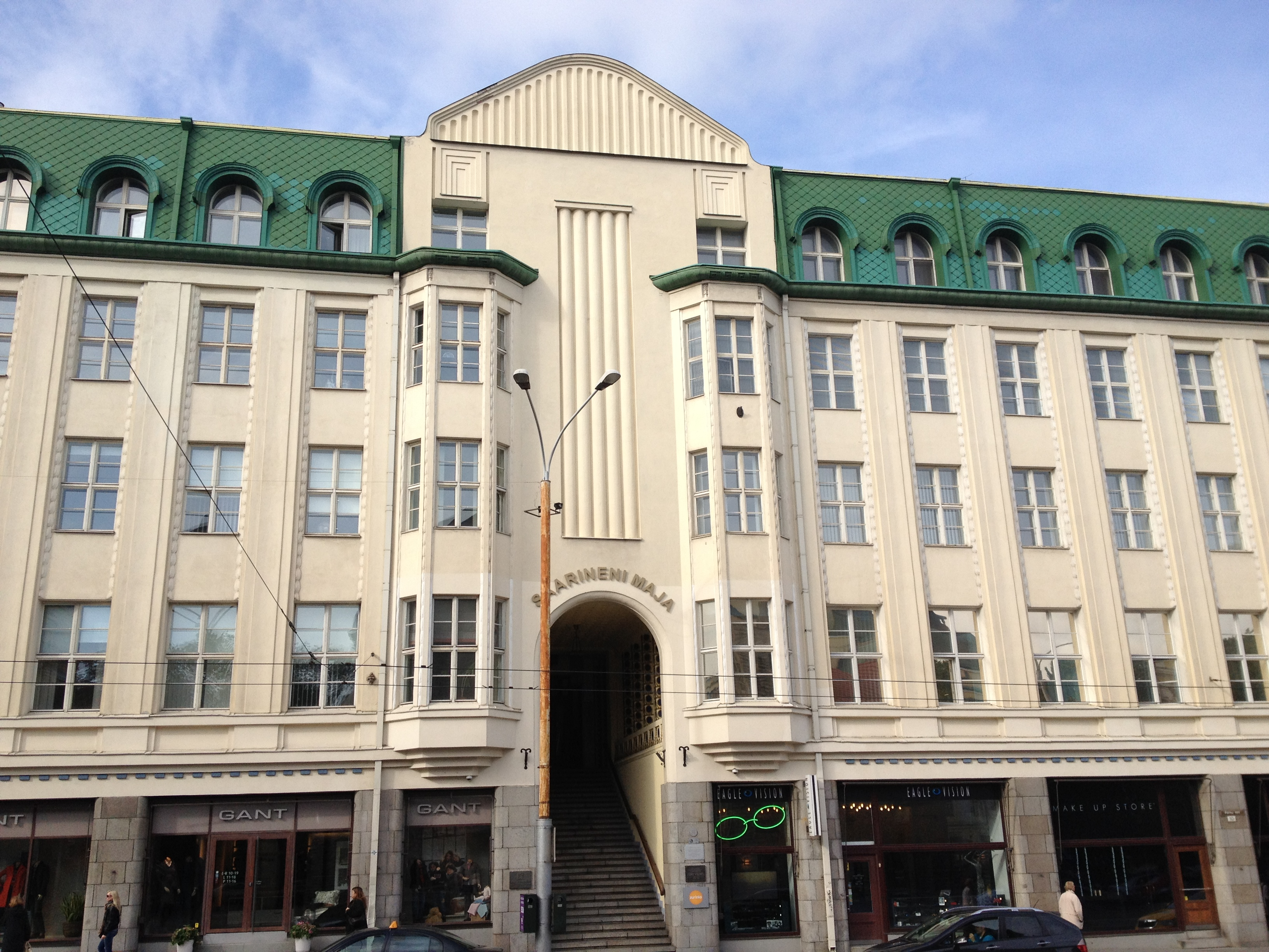 Elamu Pärnu mnt 10 äriruumide ja siseõuedega, 1911-1912.a.